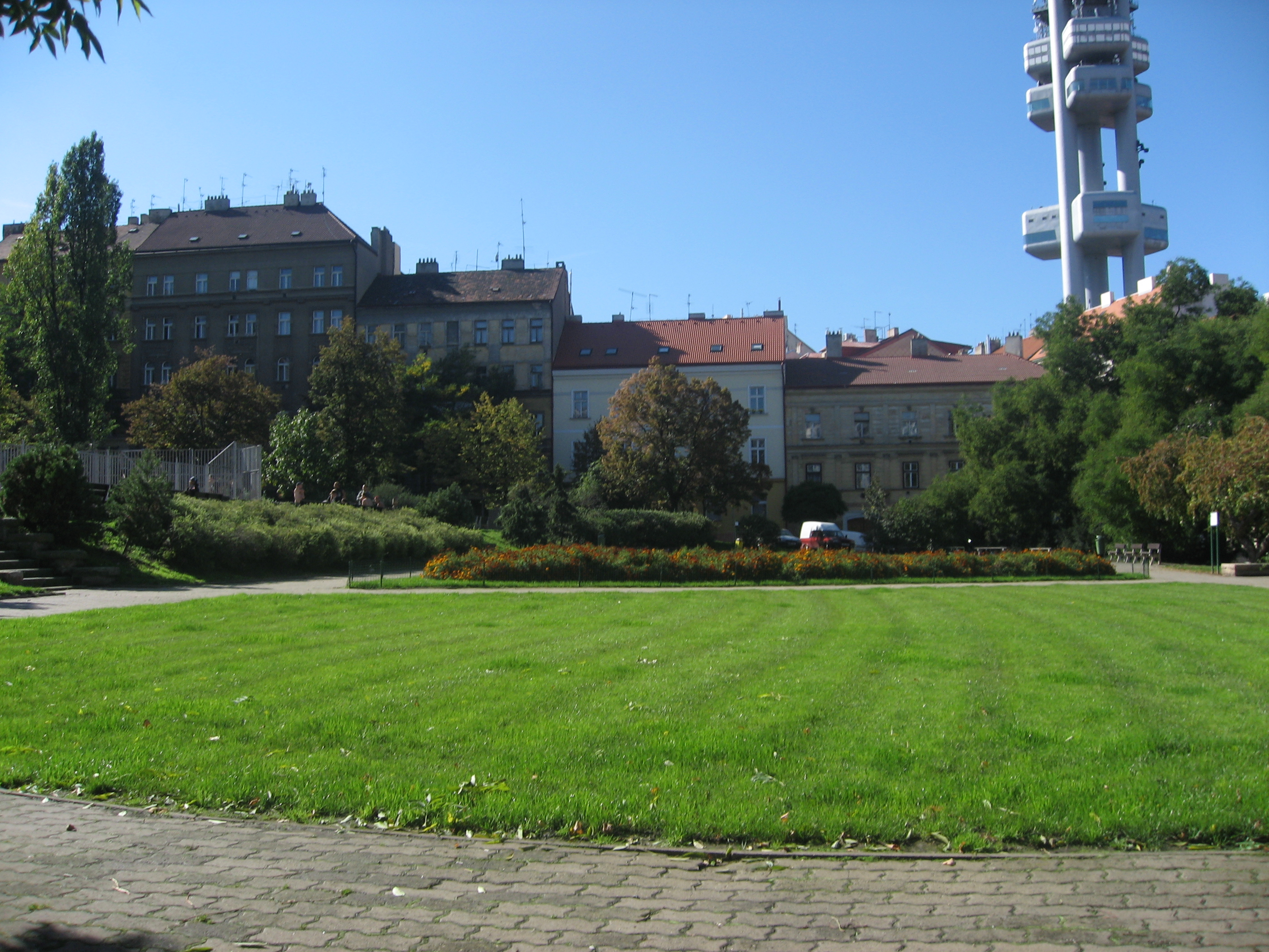 Žižkovo náměstí